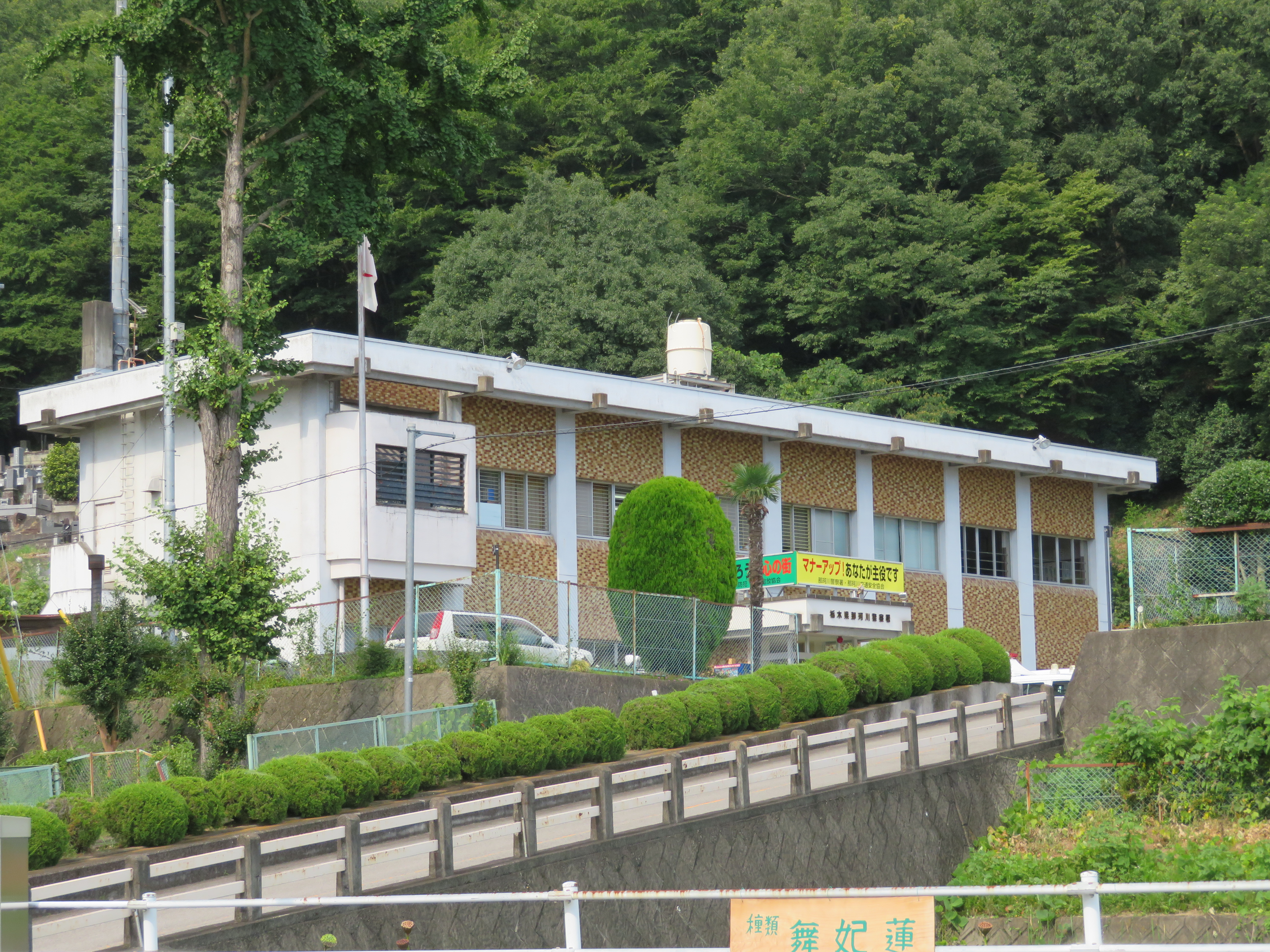 栃木県警察那珂川警察署庁舎